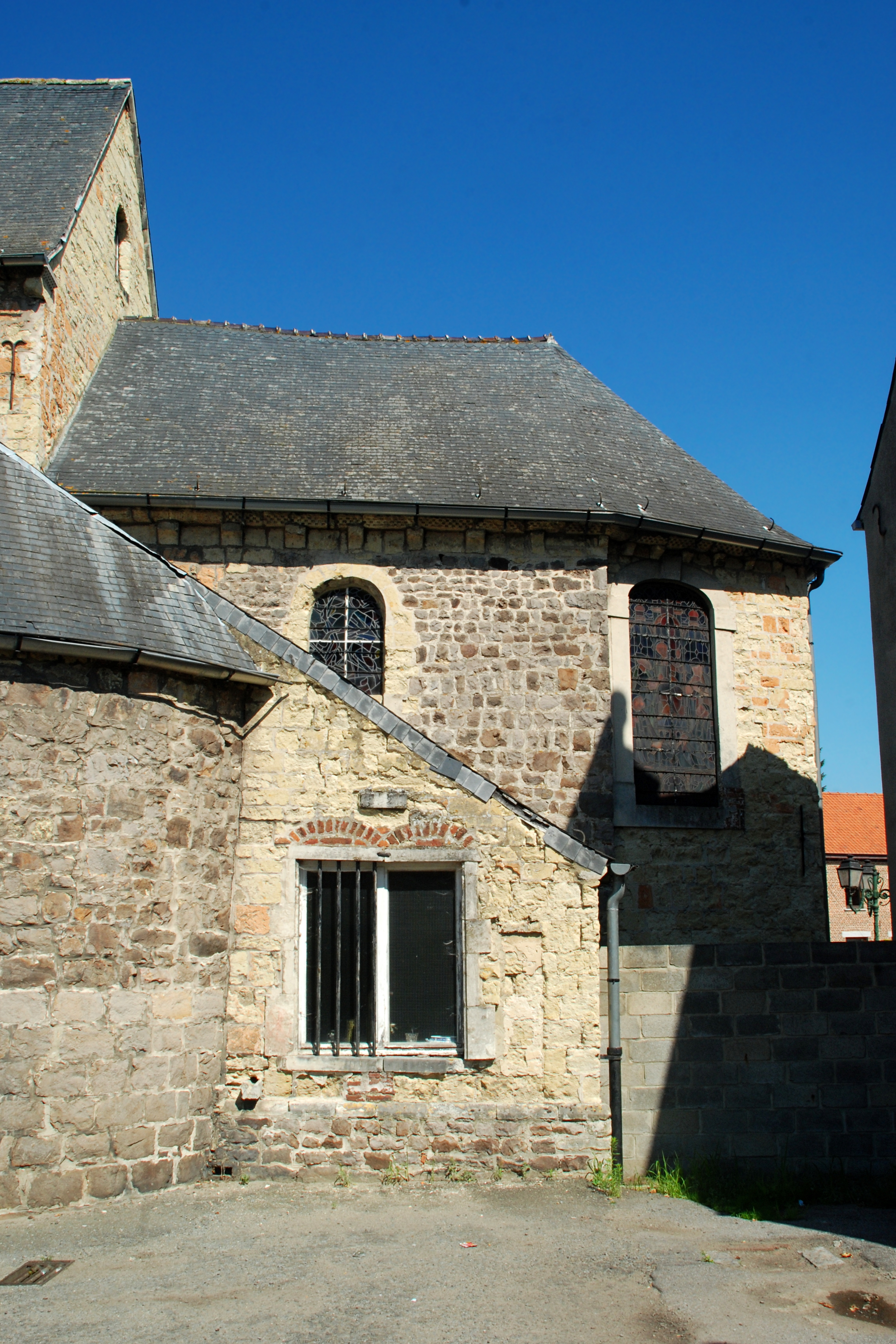 Belgique - Brabant wallon - Hélécine - Neerheylissem - Eglise Saint-Sulpice